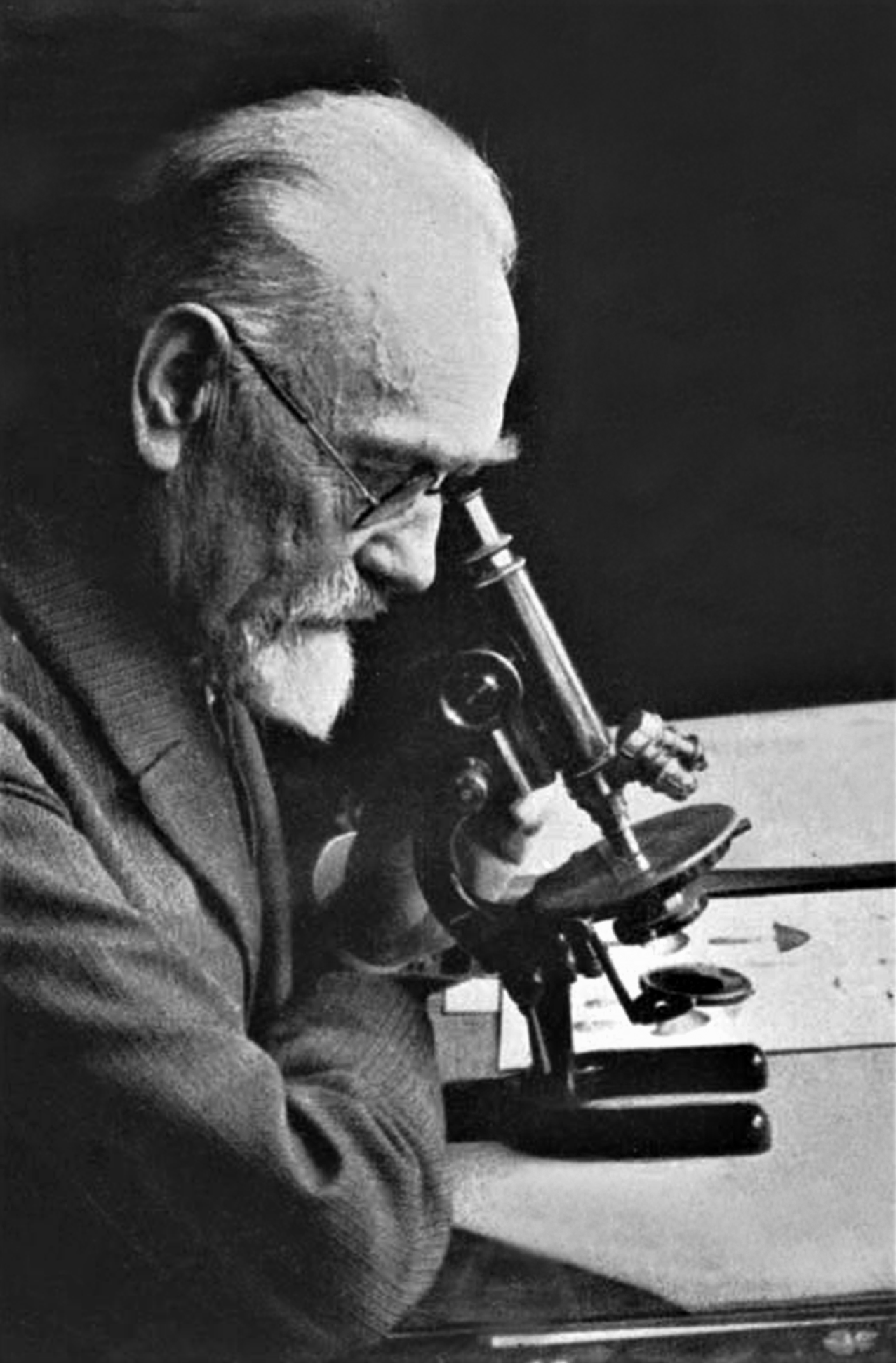 Jakob Emanuel Lange (1864-1941), Botaniker, Mykologe, Politiker, um 1940